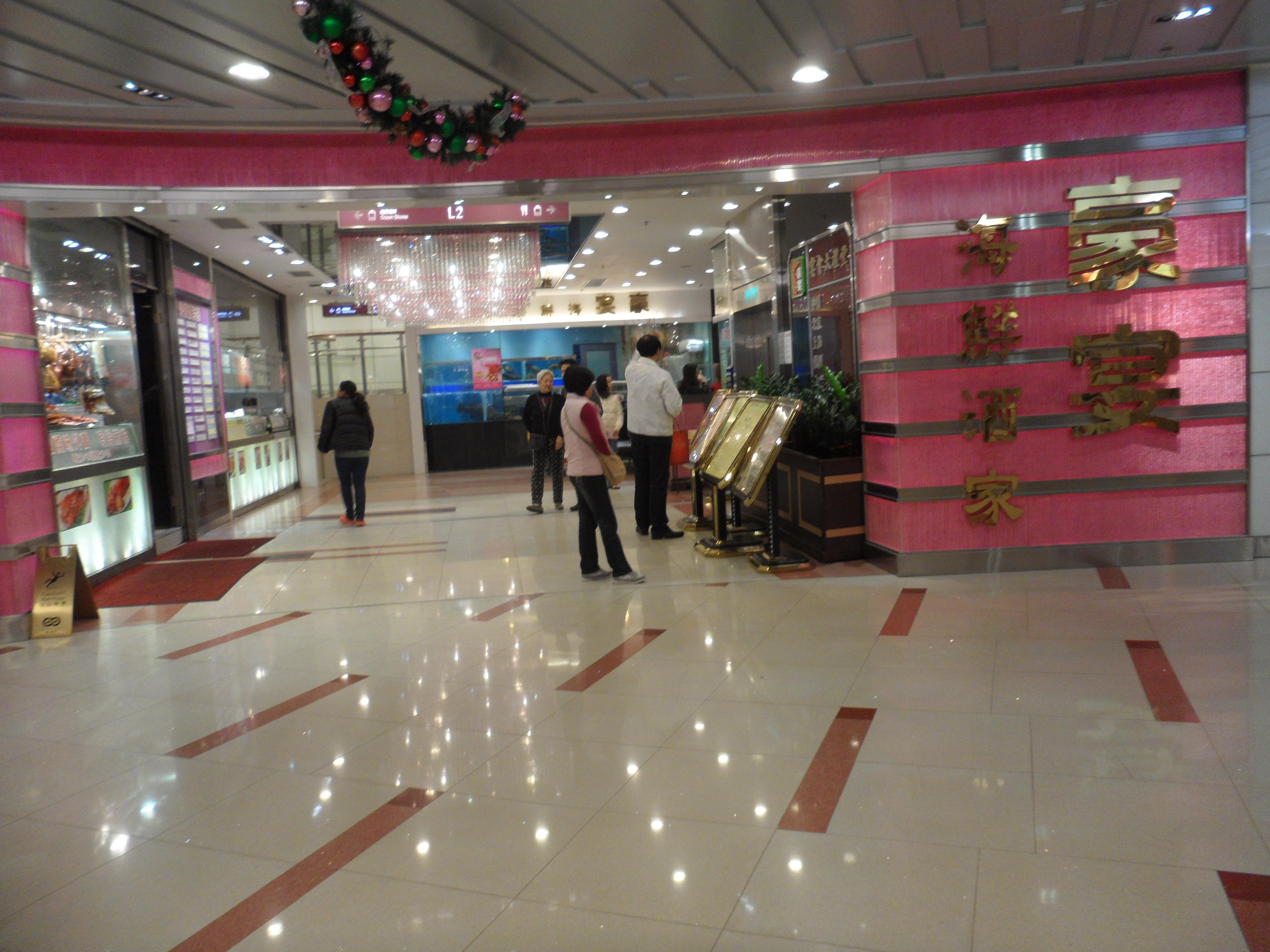 城中駅及都會駅的豪宴海鮮酒家